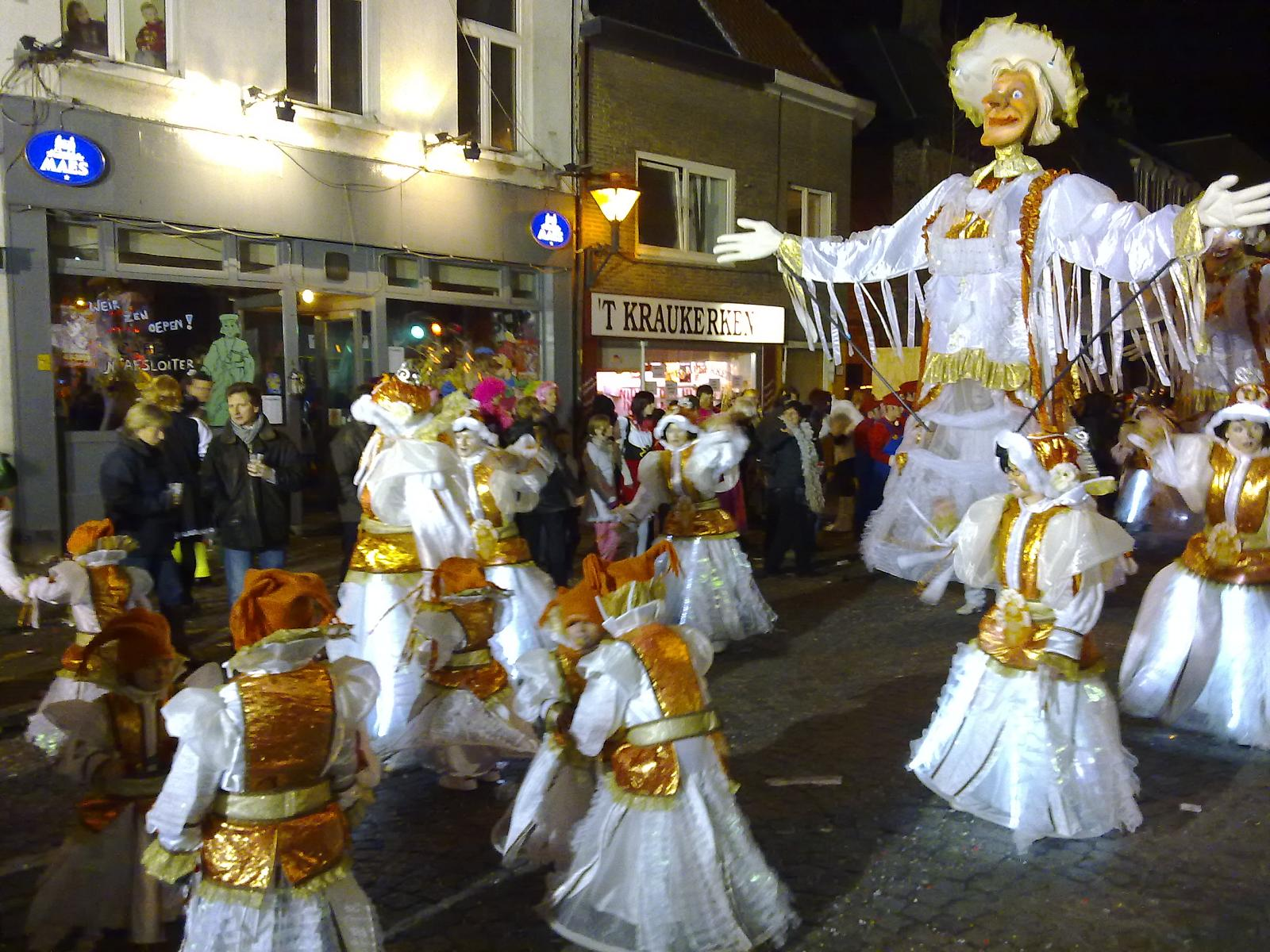 Sfeerbeeld van de carnavalszondag in Aalst. De foto's zijn genomen in de Pontstraat, net voor de Grote Markt. Possensje viert zijn twintigste verjaardag met reuzen: 'Reuze(n) Dekenoien Braderie'. Mardi Gras in Aalst, Belgium.